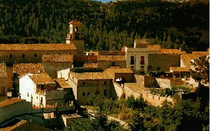 Vallbona d´anoia